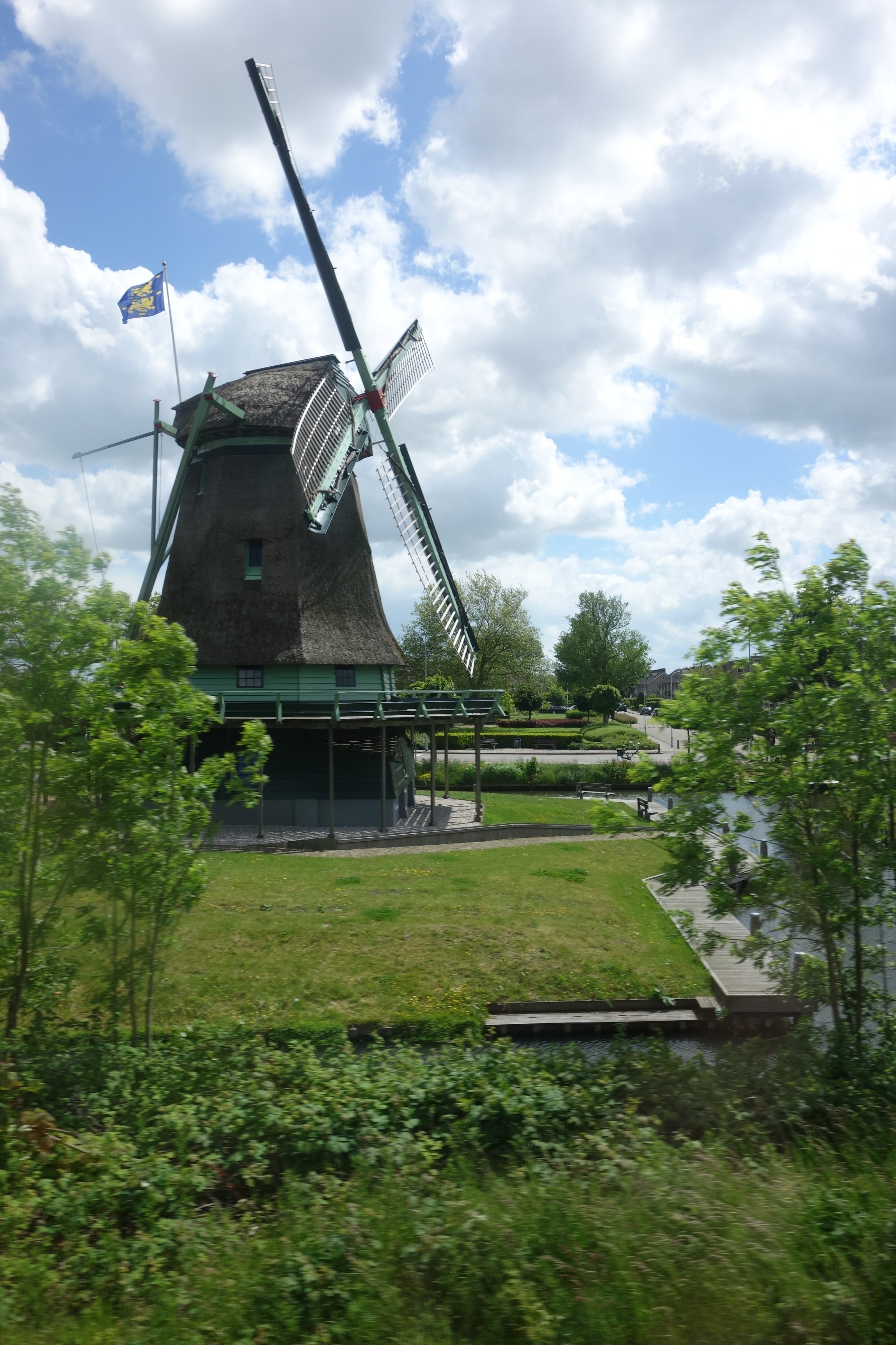 Molen Ceres aan de Broekerhavenweg 80 in Bovenkarspel.